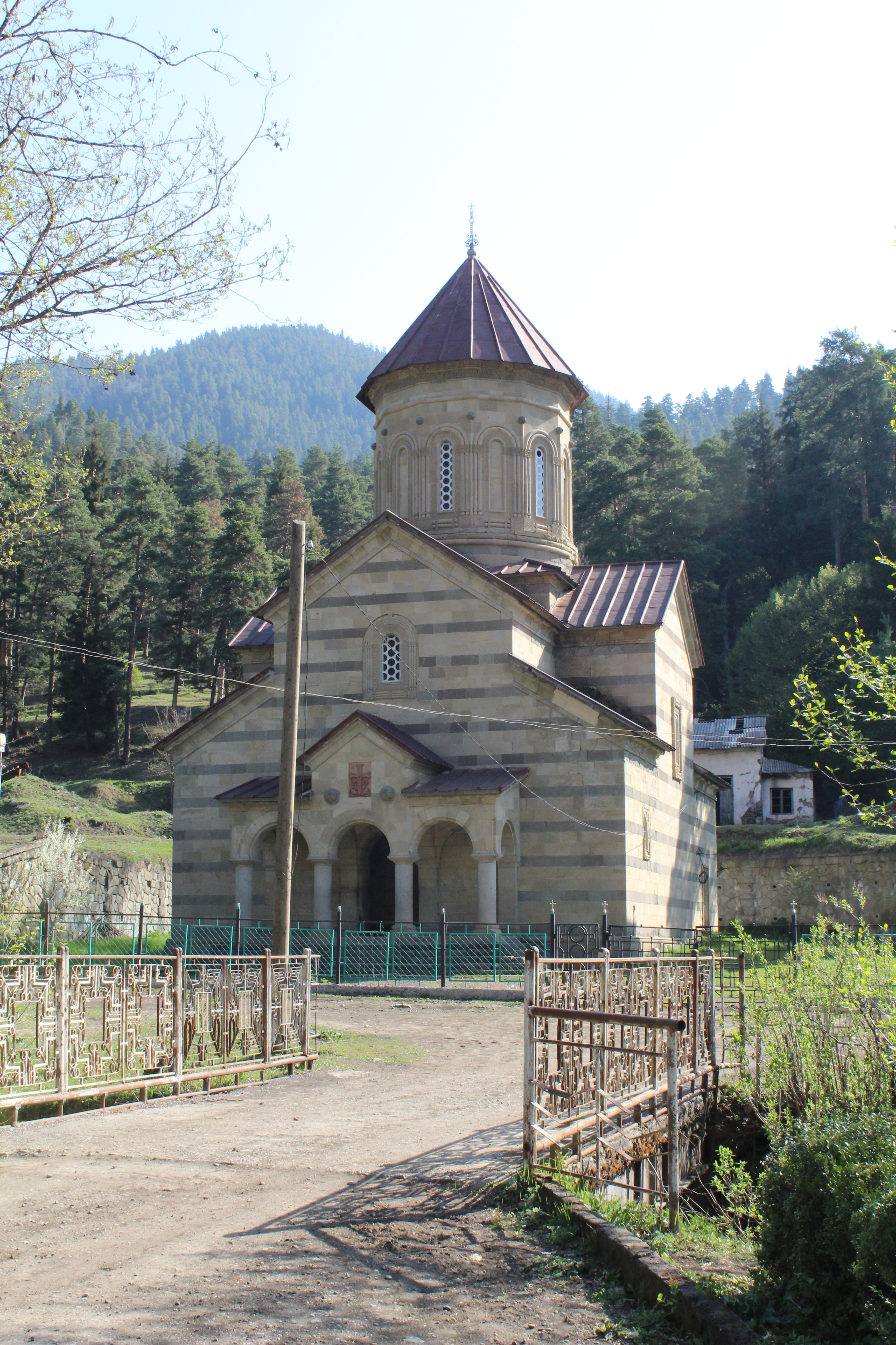 „ახალი ზარზმა“